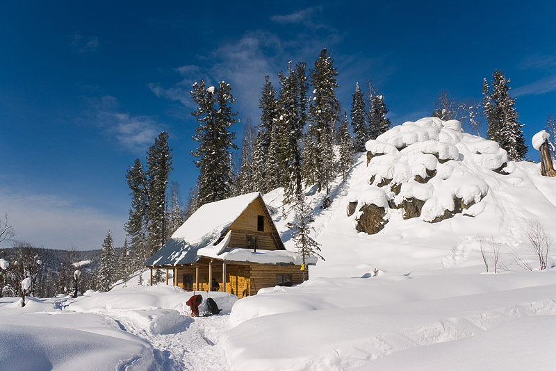 Приют Глухариный, Поднебесные Зубья, Кузнецкий Алатау